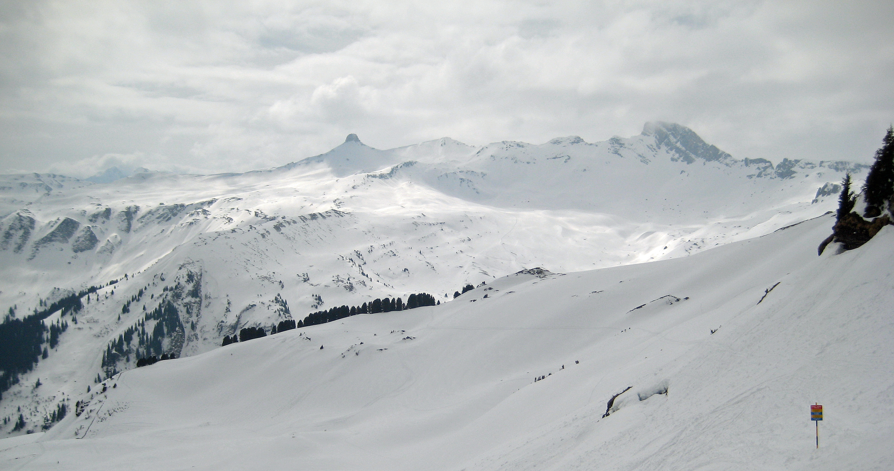 Spitzmeilen (2501 m, Mitte), Wissmilen (2483m, rechts davon) und Magerrain (2524m, rechts) vom Maschgenkamm (Flumserberg)